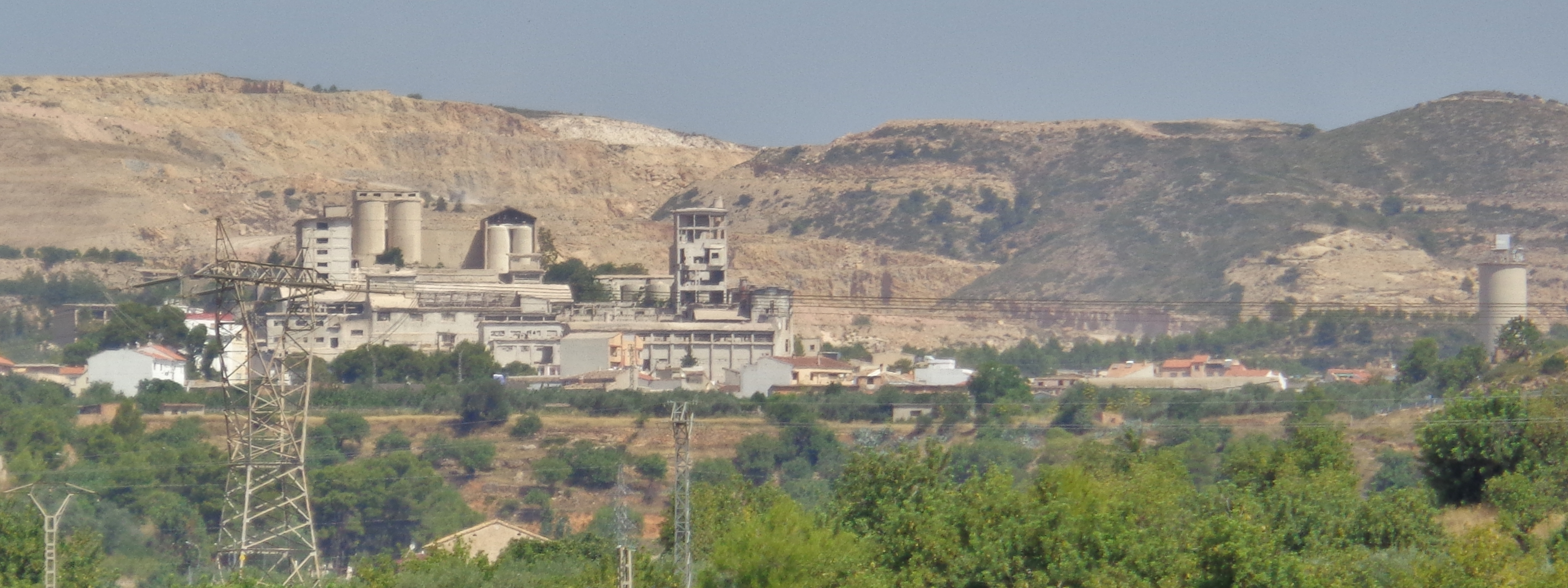 Bunyol.